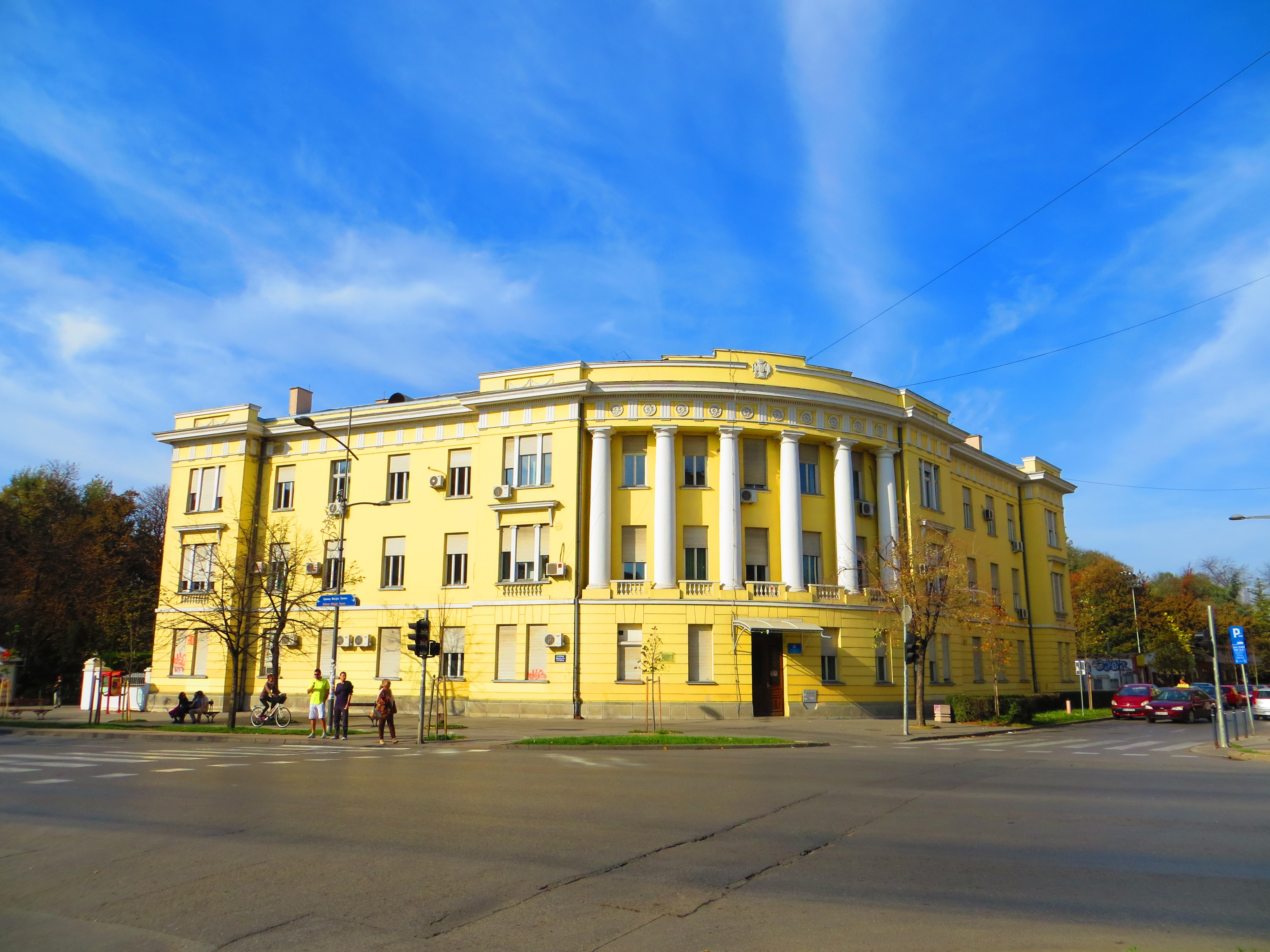 Dom zdravlja